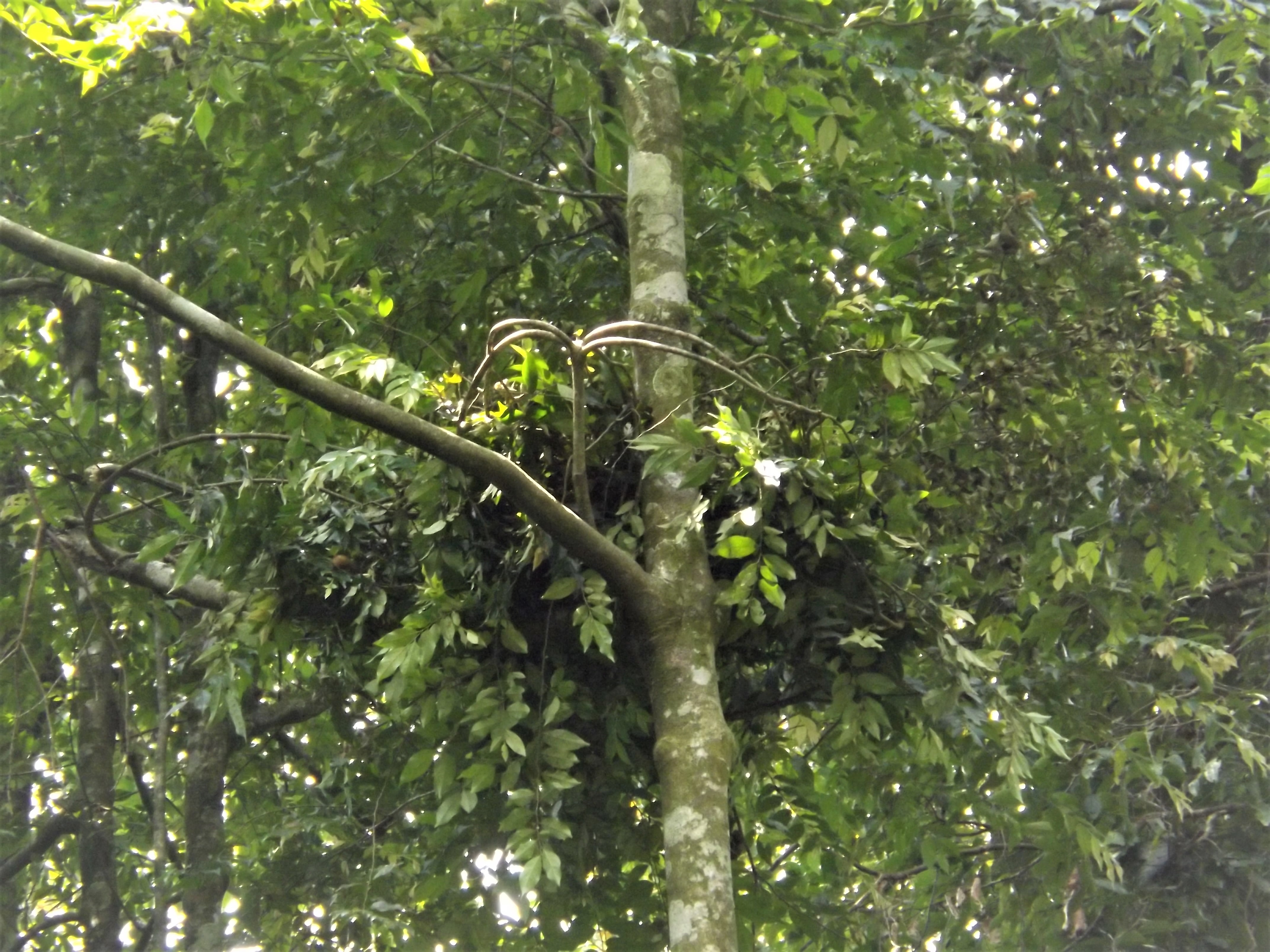 Nid d'un orang-outan de Sumatra dans le Parc national du Mont Leuser, près de Bukit Lawang (province de Sumatra du Nord, Indonésie).